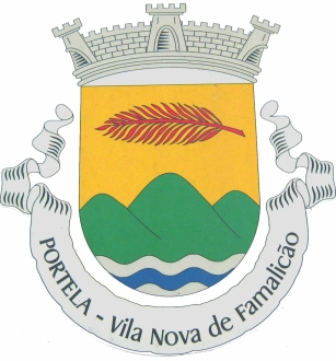 Brasão de Portela (Vila Nova de Famalicão)